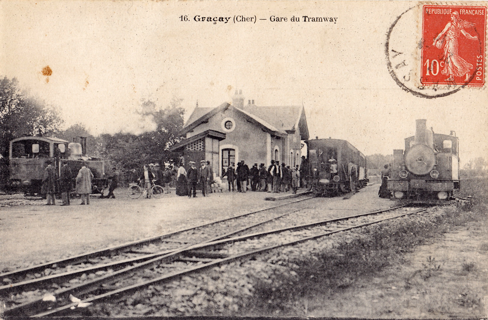 Carte postale ancienne éditée par Maquaire : GRACAY - Gare du Tramway